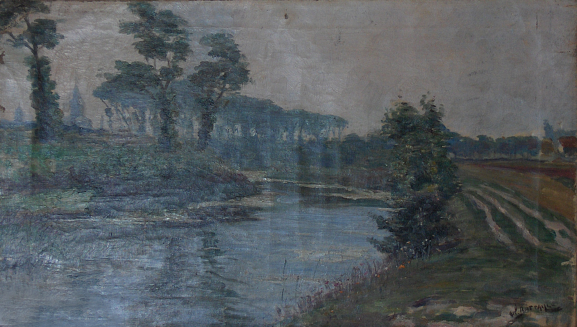 "Rivierlandschap", olieverf op doek (33 x 60 cm), getekend door Willem Battaille (1867-1933)